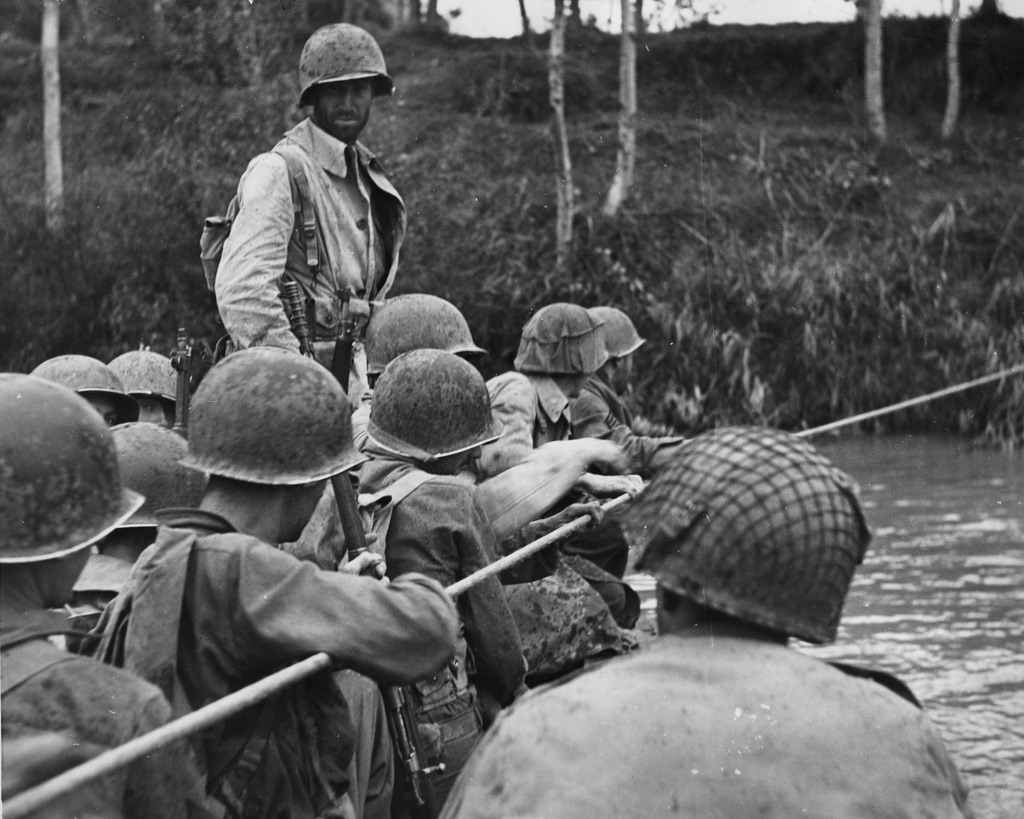 Fanti americani si apprestano a superare il Volturno a bordo di un gommone